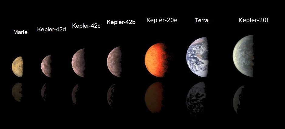 Comparação dos tamanhos de Marte, Kepler-42d, Kepler-42c, Kepler-42b, Kepler-20e, Terra e Kepler-20f. Versão em língua portuguesa de File:Sizing Up Exoplanets.jpg